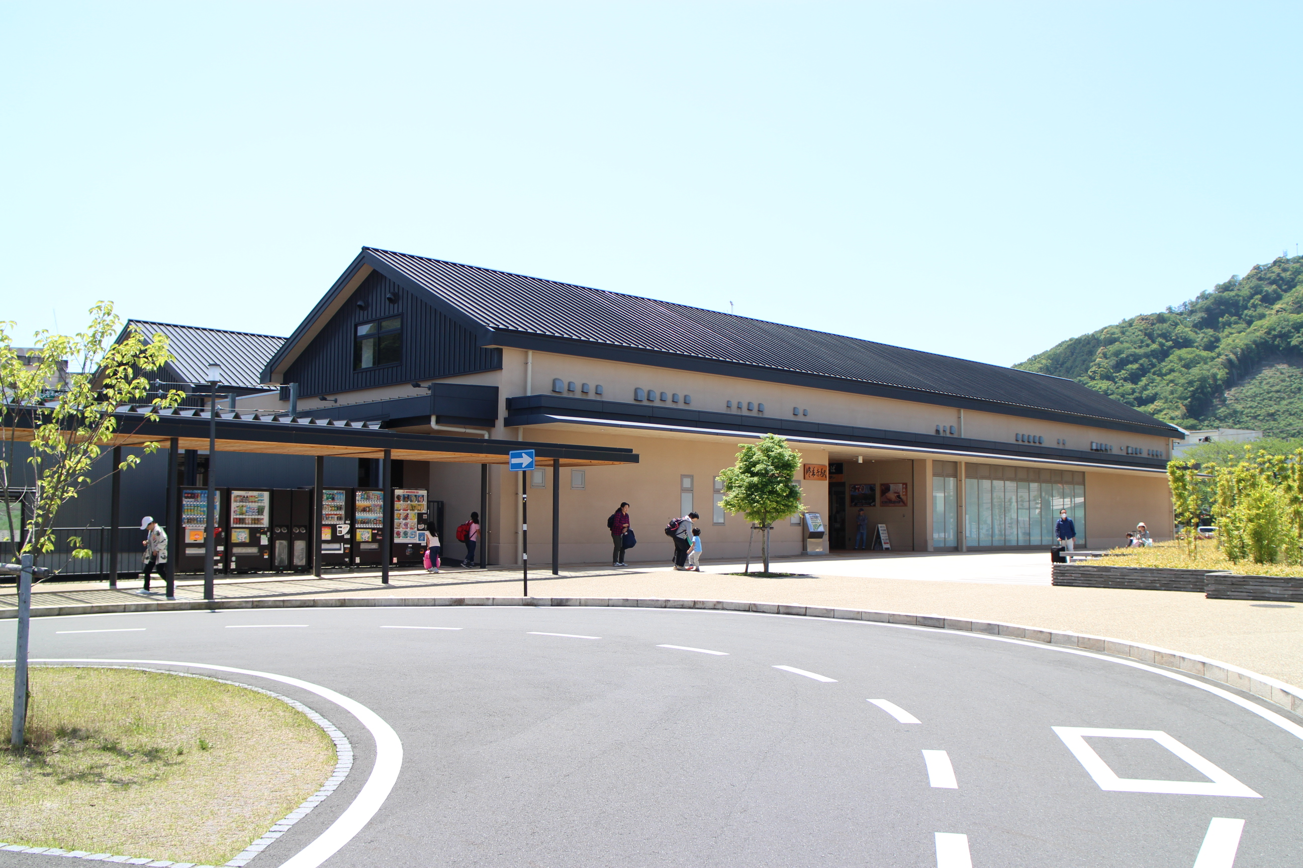 修善寺駅北口